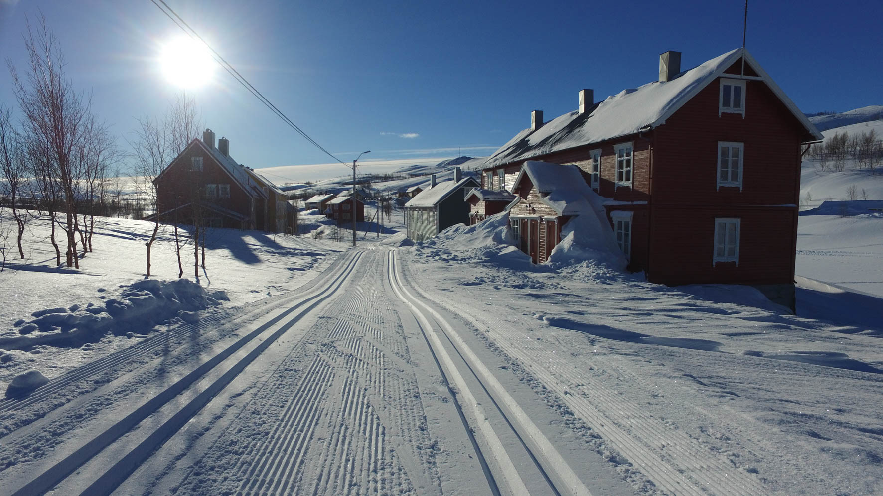 Foto: Per Ludvig Mosti